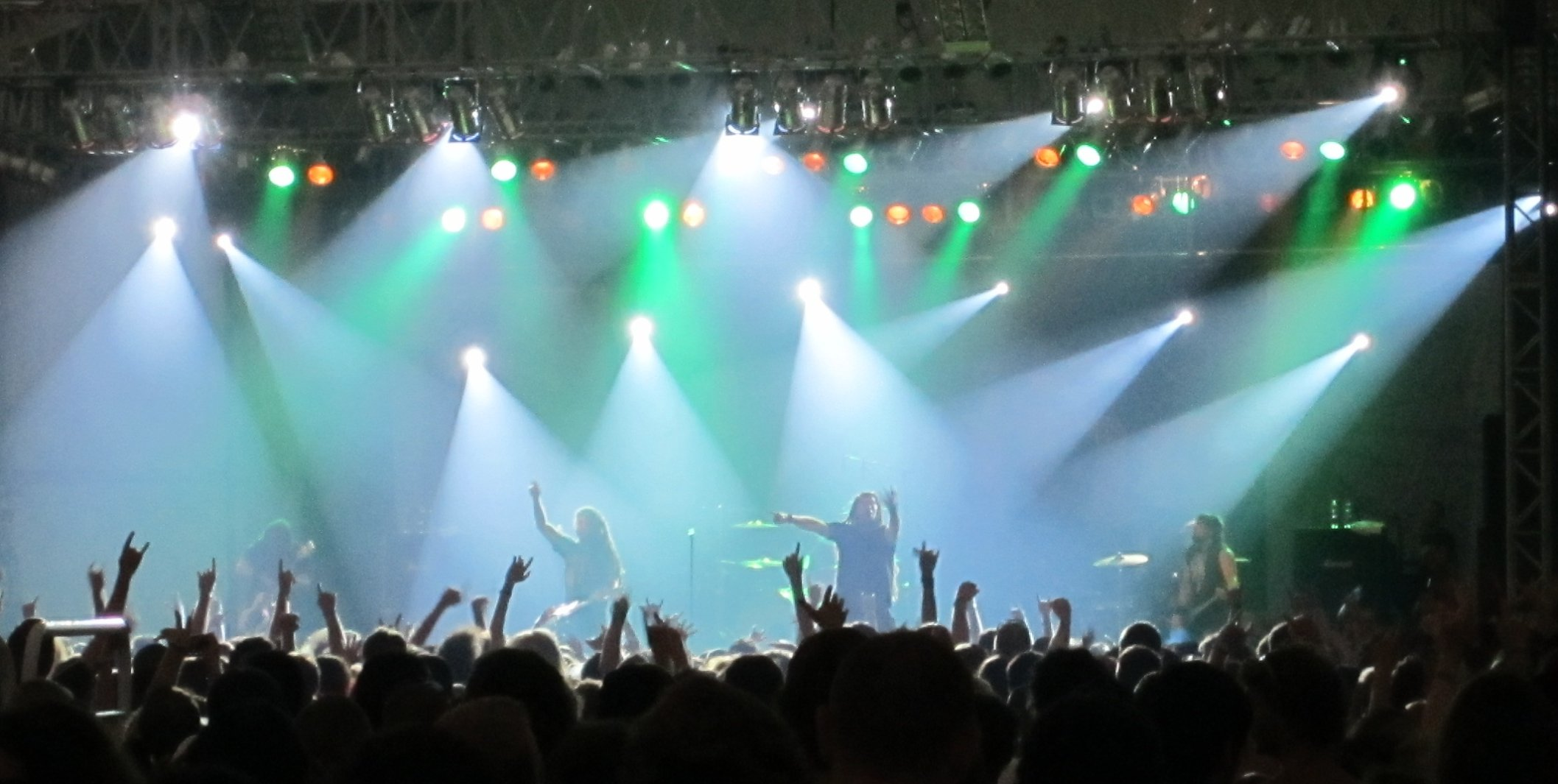 Ill Niño am Sziget Festival 2010 (Budapest)